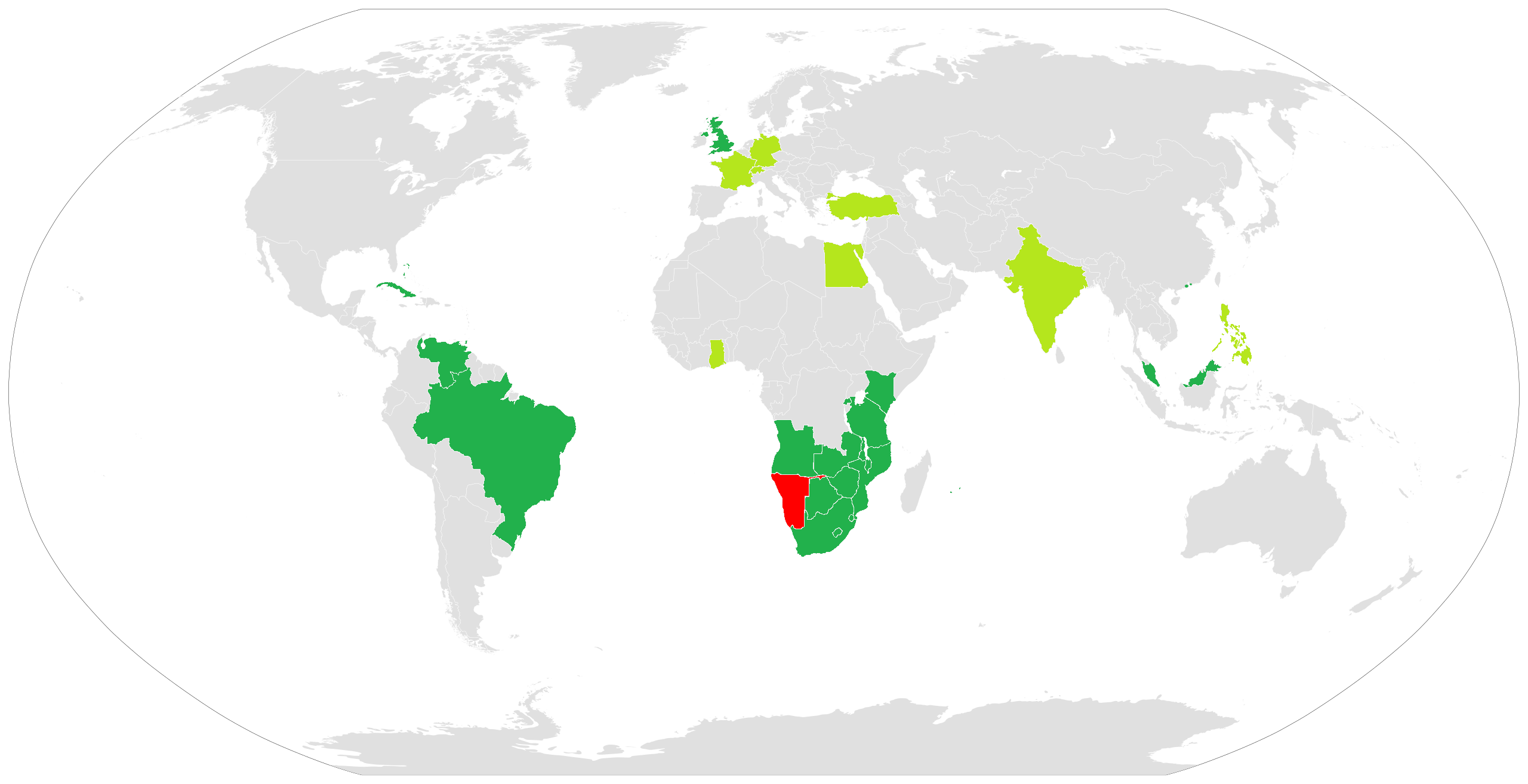 Visaanforderungen für namibische Passinhaberdunkelgrün = Visafreiheit; hellgrün = Visafreiheit nur für Diplomaten-/Dienstpässe; rot = Namibia